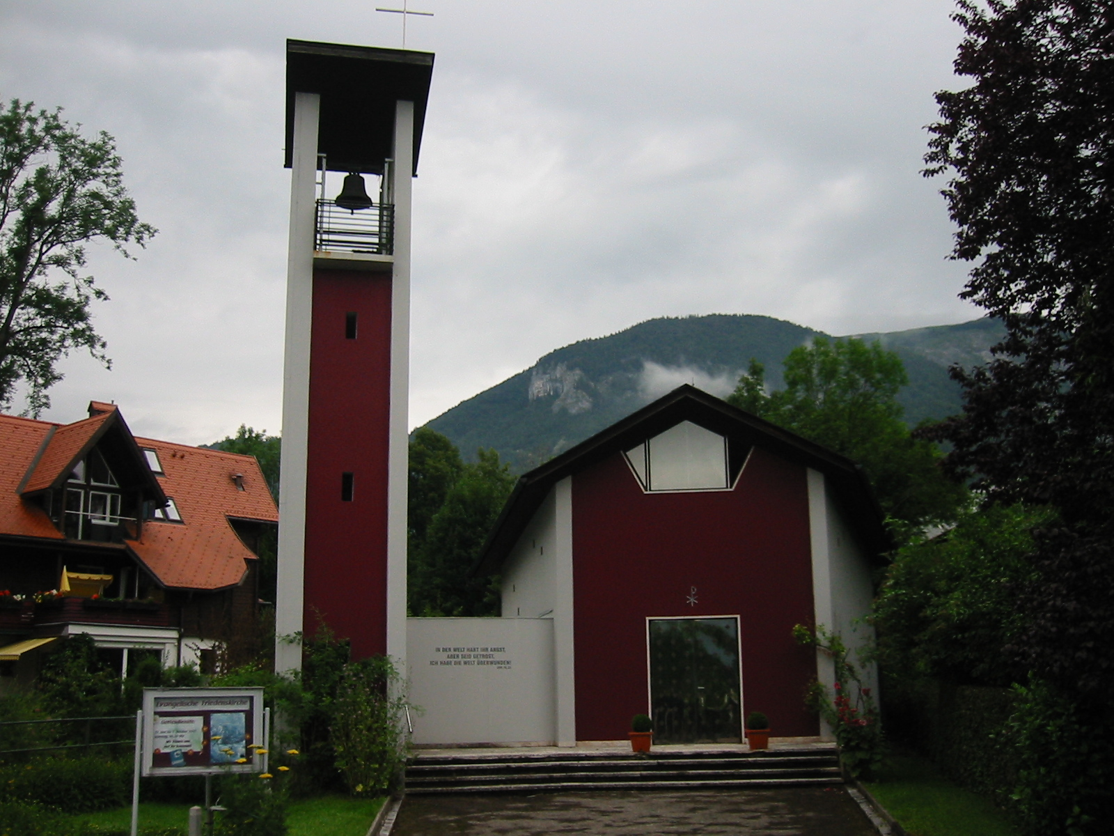 Evang. Pfarrkirche A.B.